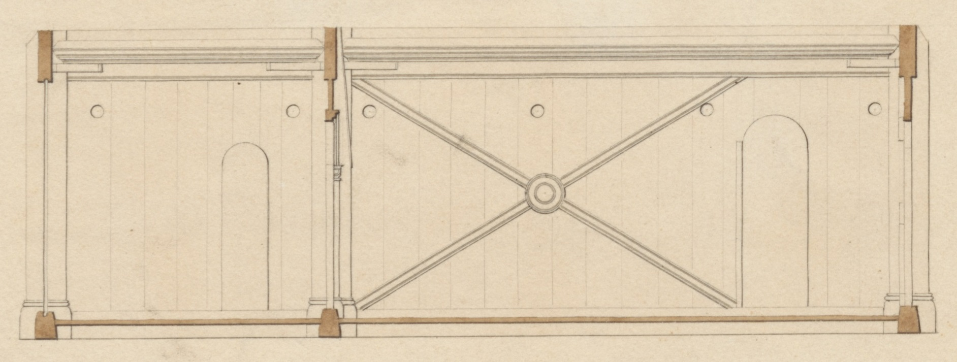 Lengdesnitt fra Vangsnes stavkirke, tegnet av Georg Bull i 1854. Utsnitt av større bilde.